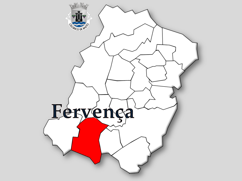 Censos 1864/2011